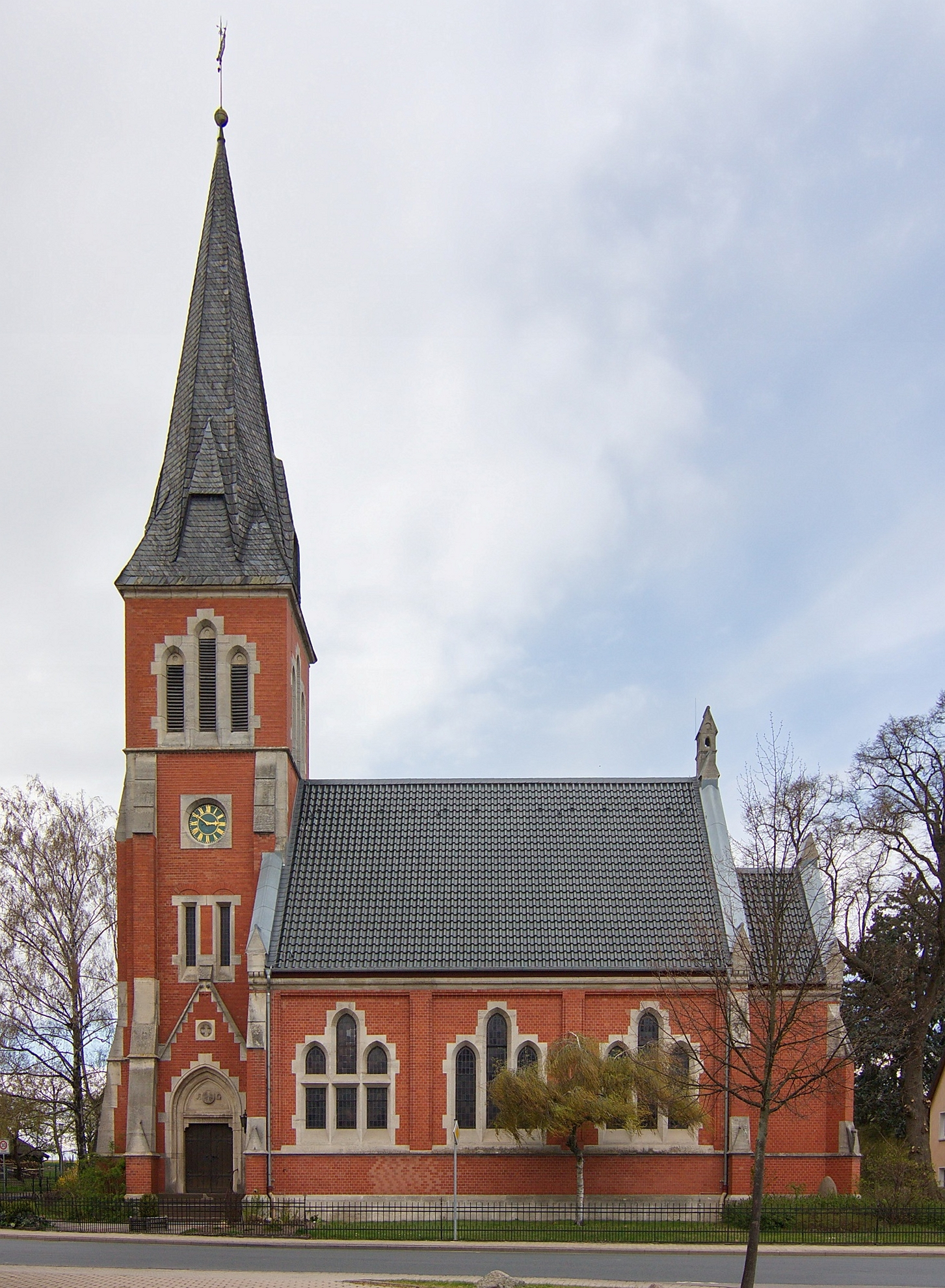 St.Johannis-Kirche in Duttenstedt (Peine), Niedersachsen, Deutschland.